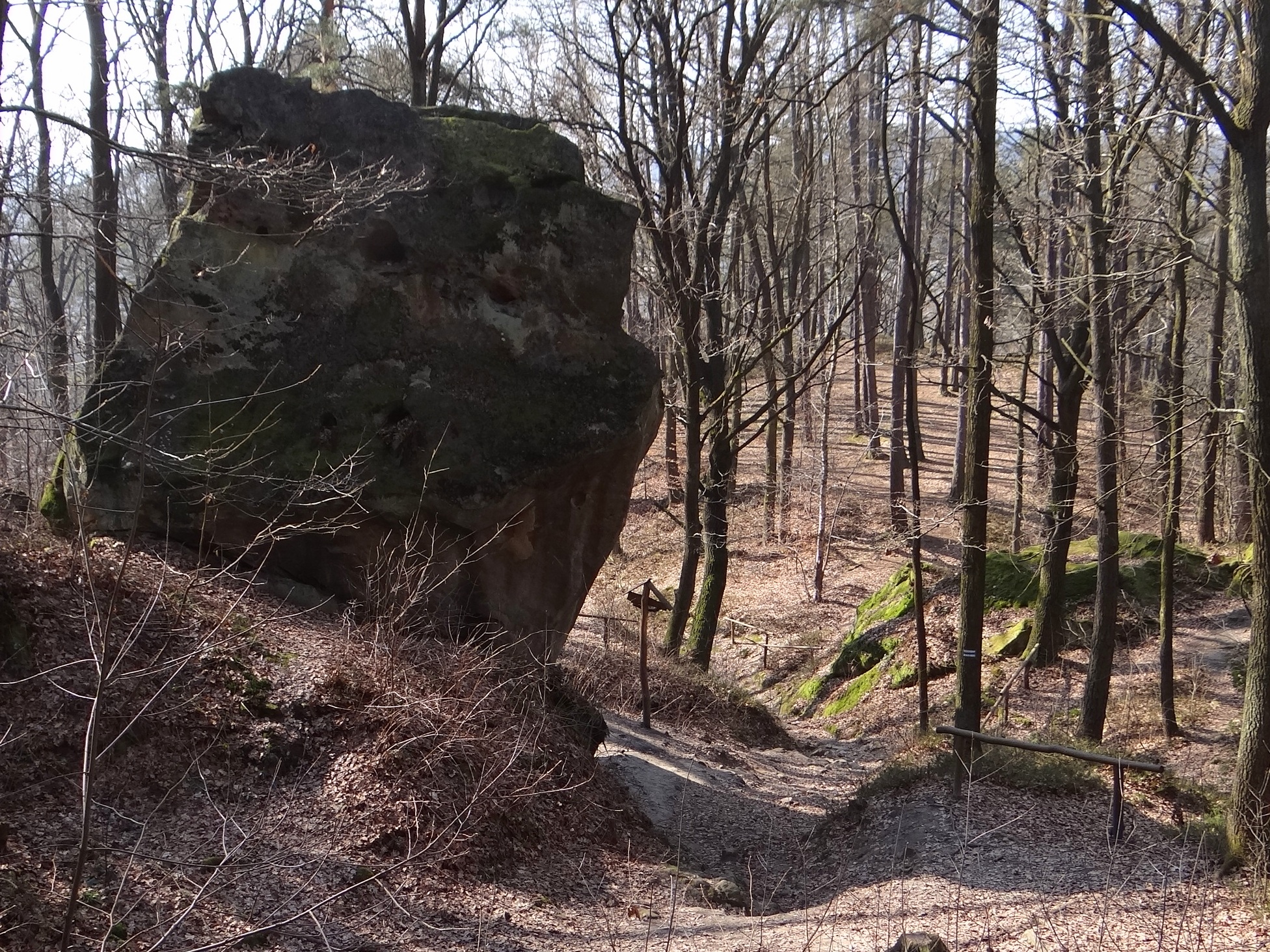 "Warownia Dolna" w rezerwacie przyrody Skamieniałe Miasto w Ciężkowicach